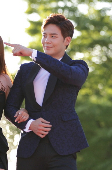 제19회 부천국제판타스틱영화제 개막식 레드카펫 part.2